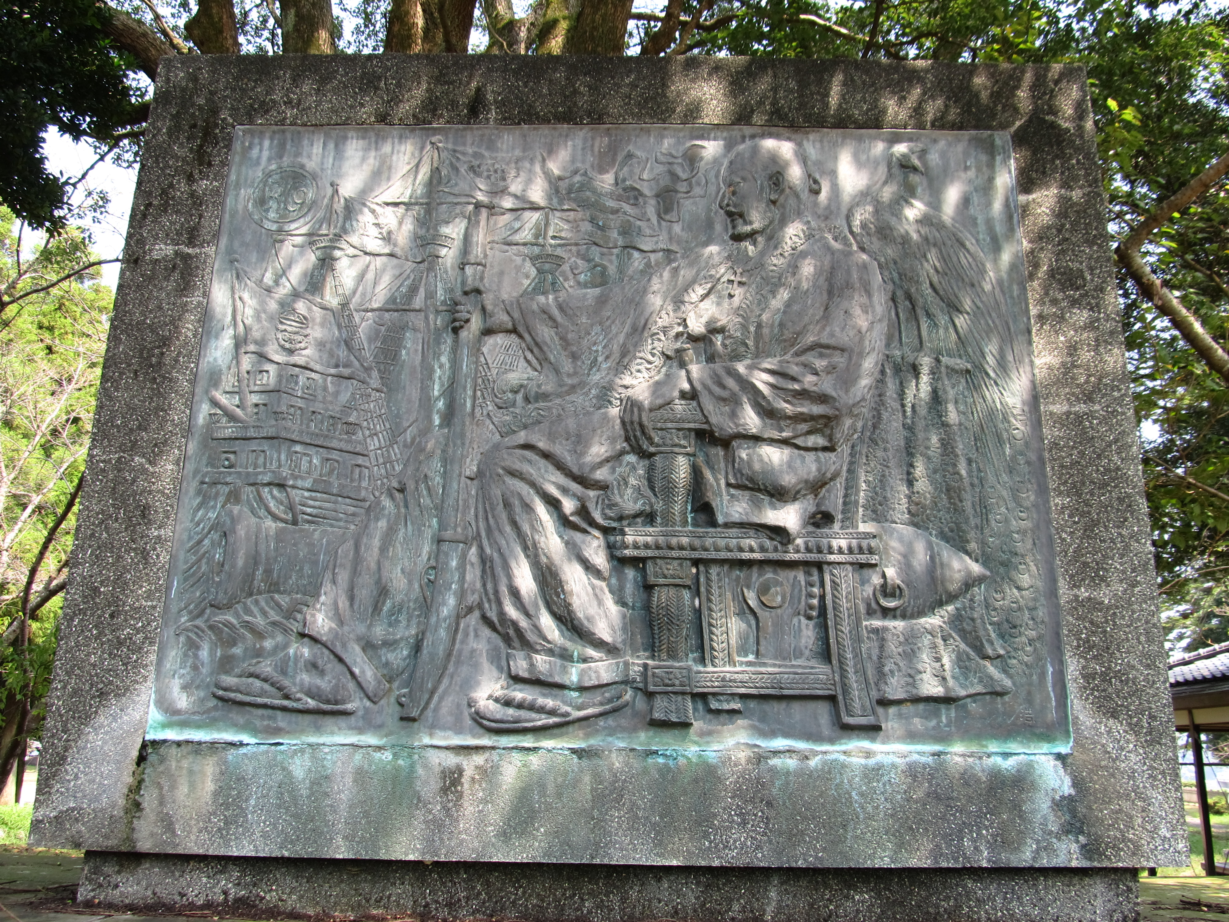 大分県臼杵市の臼杵公園（臼杵城跡）にある大友宗麟のレリーフ。 最初は1937年に日名子実三が制作したが戦時の金属供出で失われ、 1982年に復元制作された。